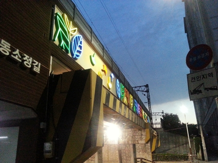 장제로 위를 지나는 경인철로의 조명 장식 (북쪽)